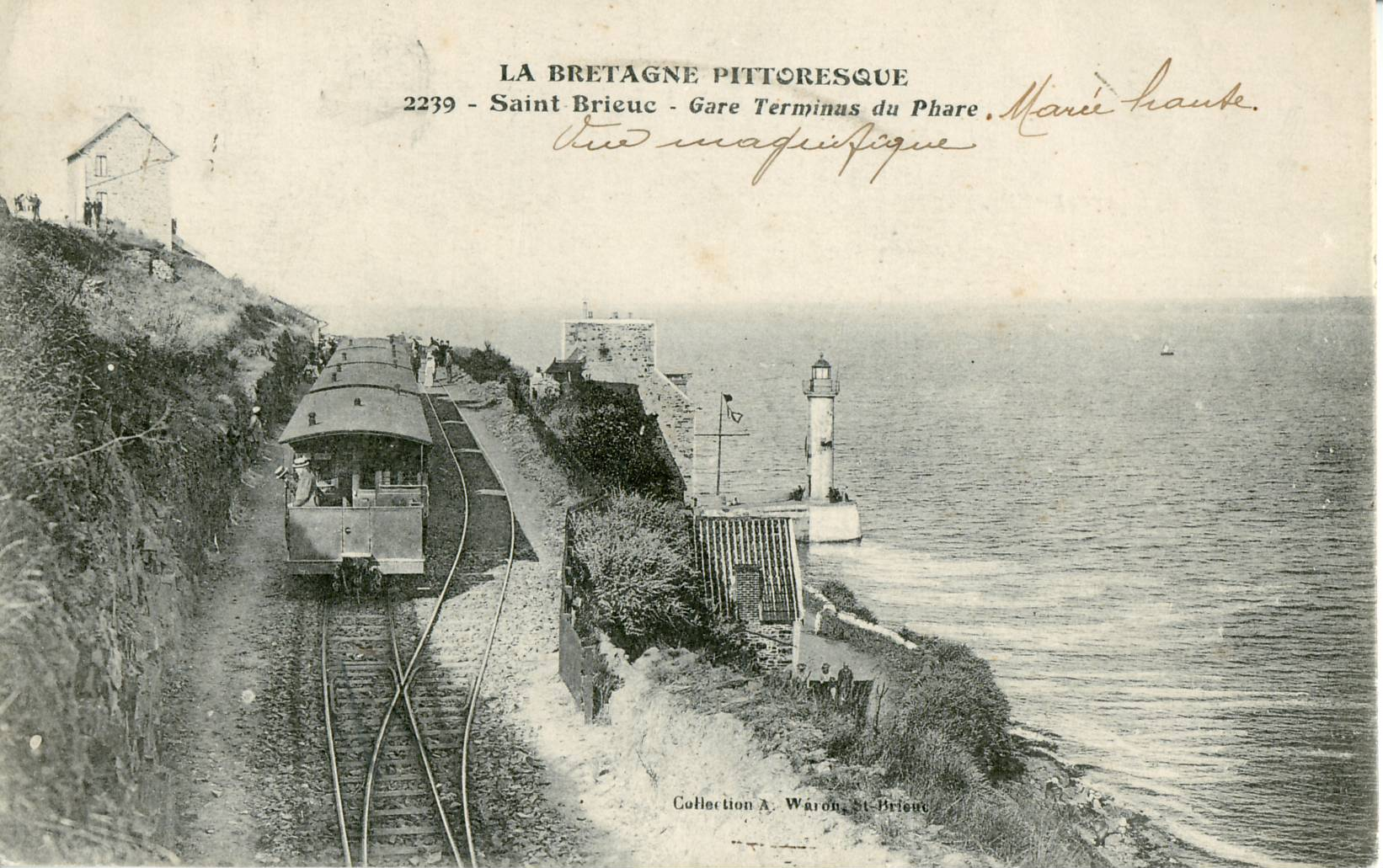 Carte postale ancienne éditée par Waron à Saint-Brieuc, n°2239La Bretagne pittoresque : SAINT-BRIEUC - Gare terminus du Phare